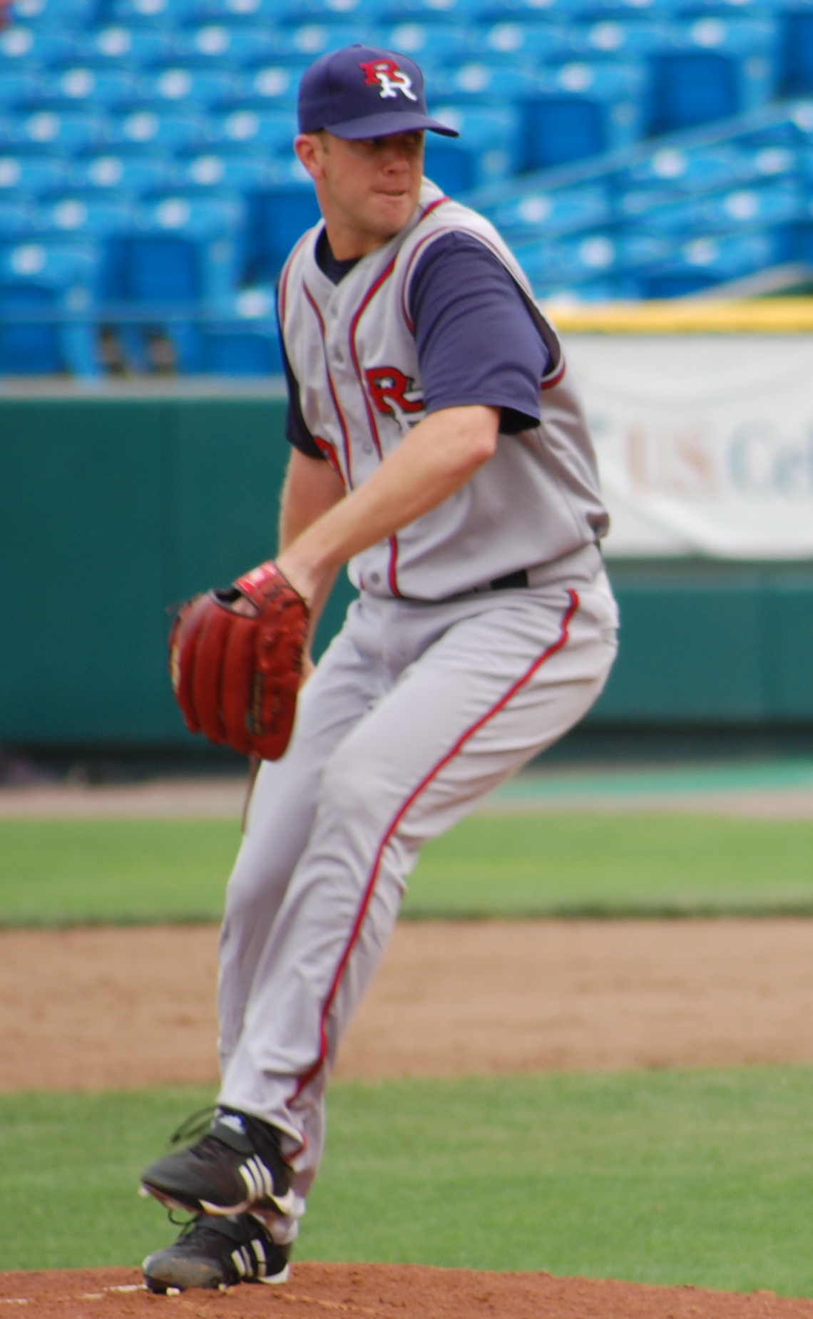 Josh Banks